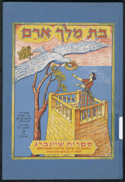 בת מלך ארם /, מעובד בידי א.י. איגוס ודניאל פרסקי על פי ביאליק ; מצוירבידי ראובן ליף Description: Bat melekh Aram, meʻubad bi-yede A.Y. Egus ṿe-Daniʾel Persḳi ʻal pi Byaliḳ ; metsuyar bi-yede Reʾuven Lif / בת מלך ארם /, מעובג בידי א.י. איגוס ודניאל פרסקי על פי ביאליק ; מצוירבידי ראובן ליף. To read the entire book, clickhere. Author: Leaf, Reuben Author: Persky, Daniel, 1887-1962 Author: Agus, Irving A., 1910- Dimensions: 32 pages Date: 1945 Persistent URL: Repository: YIVO Institute for Jewish Research, 15 West 16th Street, New York, NY 10011 Call Number: 00109309 Rights Information: No known copyright restrictions; may be subject to third party rights. For more copyright information, click here. See more information about this image and others at CJH Digital Collections. Digital images created by the Gruss Lipper Digital Laboratory at the Center for Jewish History